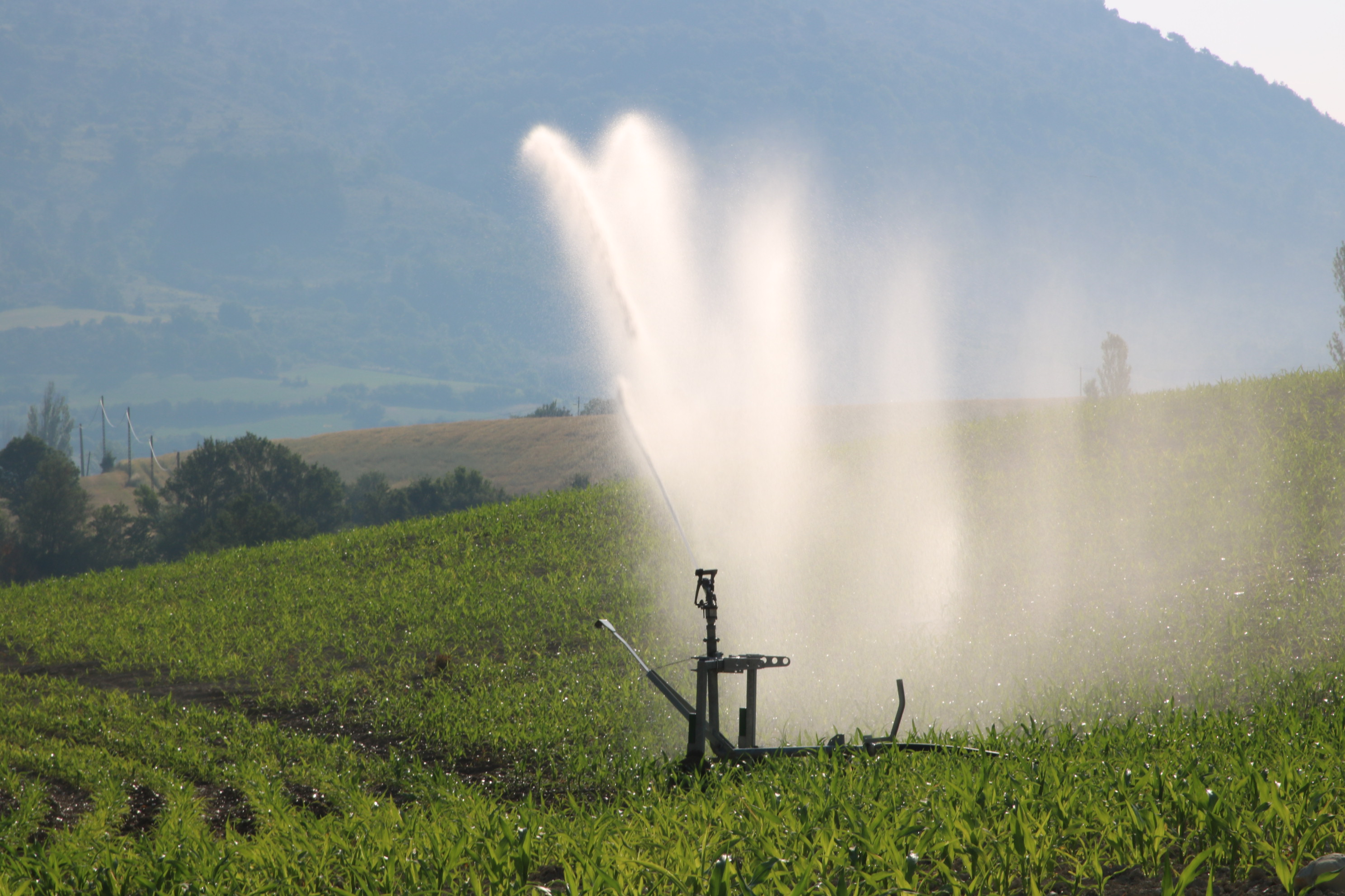 Irrigation of a cornfield in the Méouge valley